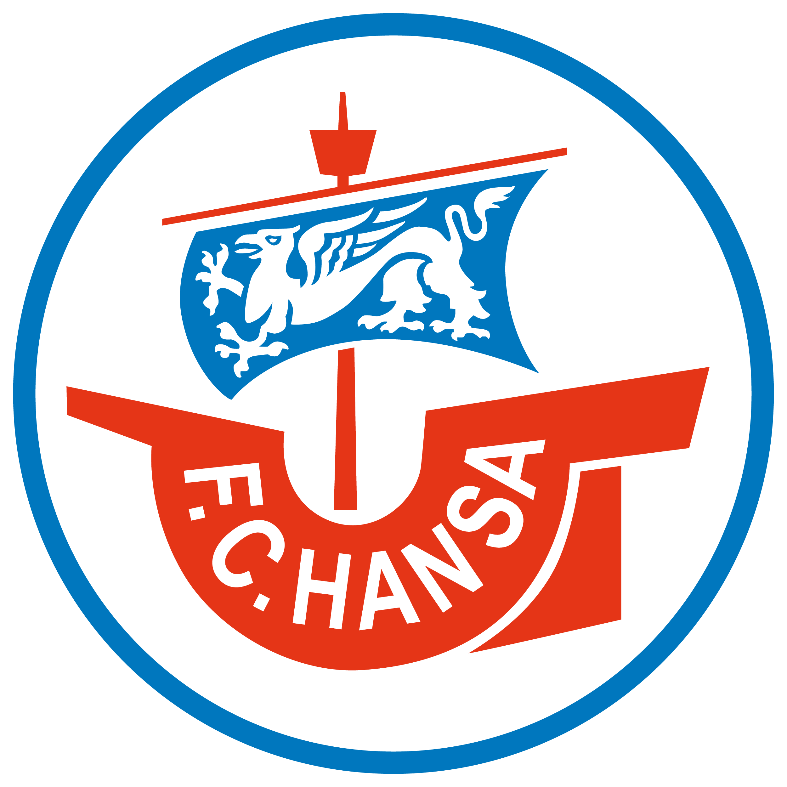 Aktuelles Vereinslogo des FC Hansa Rostock